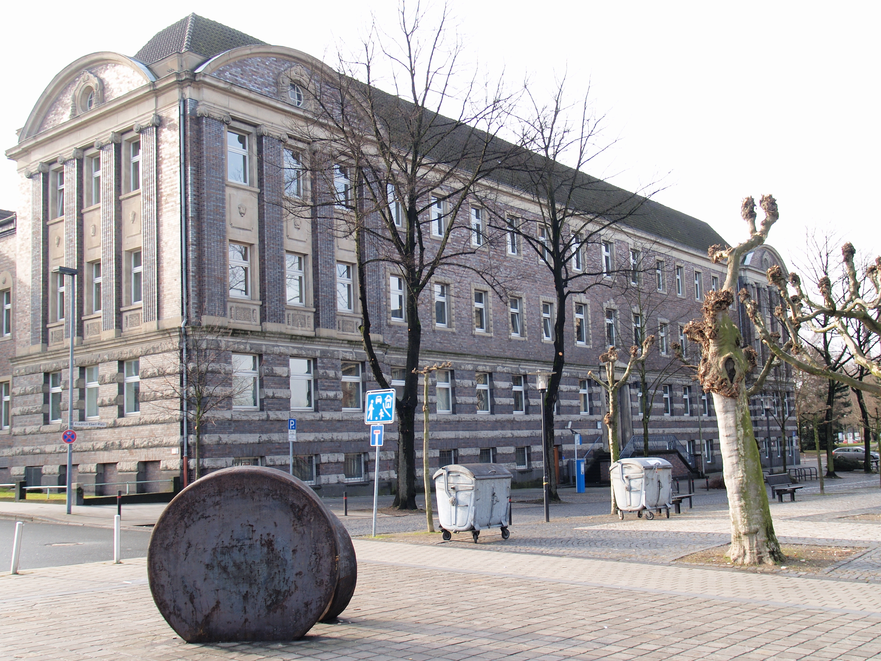 Amtsgericht Herne, Seite zum Friedrich-Ebert-Platz